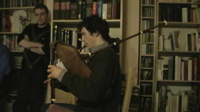 A bagpipe player Walon: On pupsakisse (Djhan Cayron) (portrait saetchî pa L. Mahin).